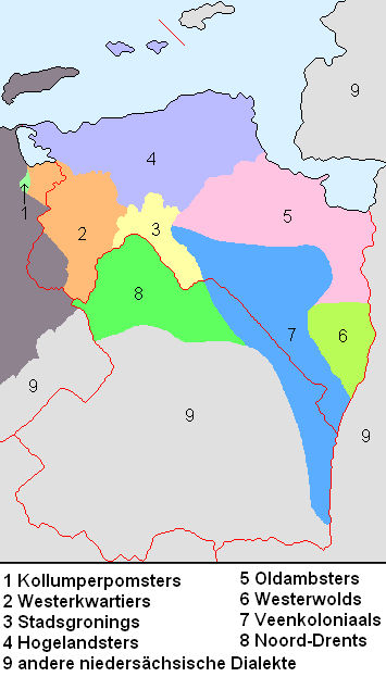 Karte der verschiedenen Dialekten des Gronings (niedersächsische Dialektgruppe in den nordöstlichen Niederlanden)